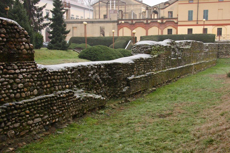 Resti di mura romane a Novara nei pressi del Conservatorio-ex collegio Gallarini, tra via Solaroli e via Dominioni.